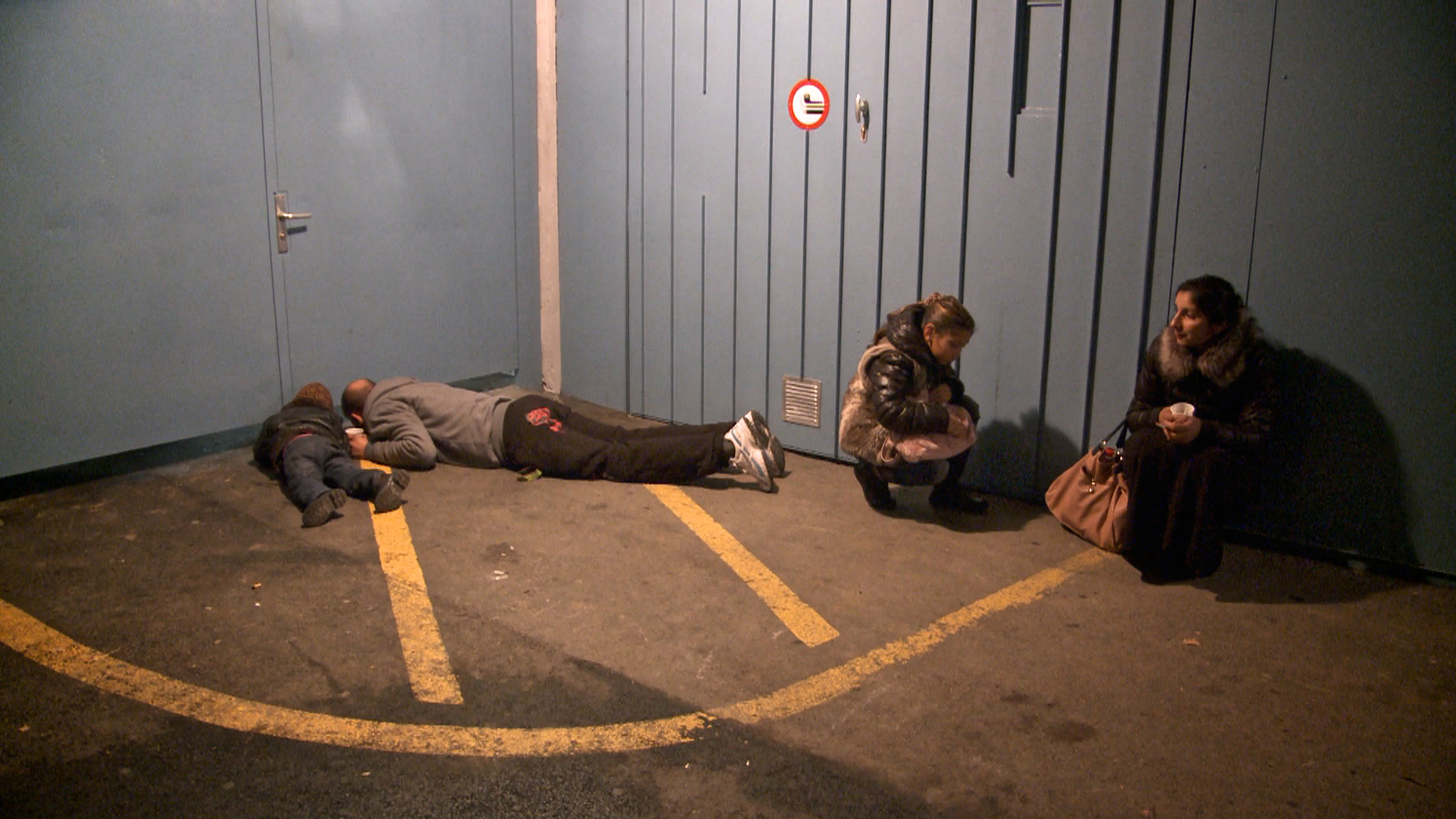 Bîrta et sa famille espèrent encore entrer à l'Abri. Image tirée du film « L’abri » de Fernand Melgar